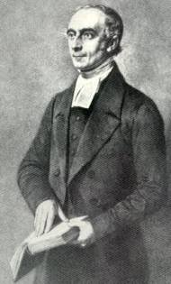 H. F. Kohlbrügge